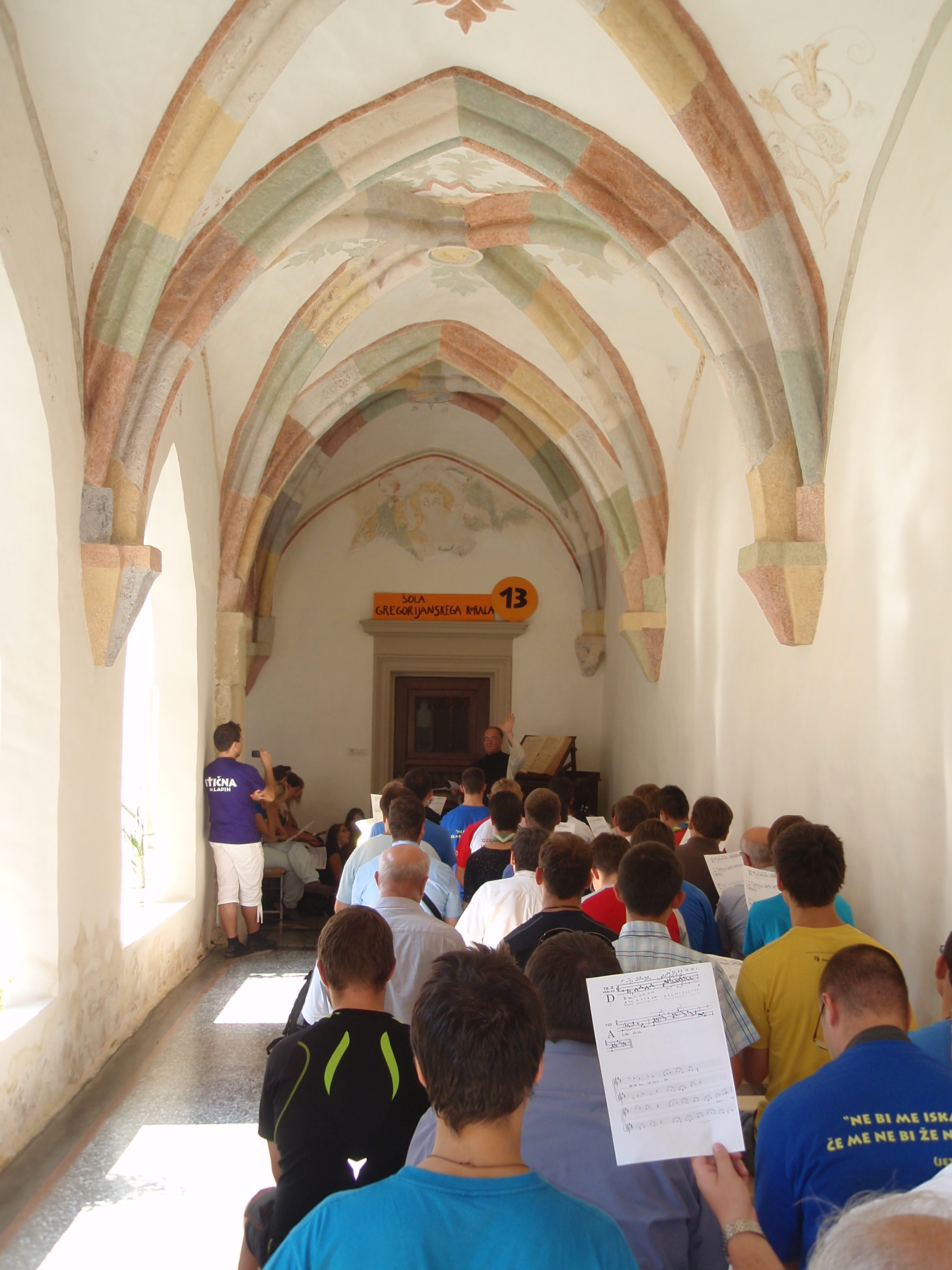 Stična mladih 2011; lessons of gregorian choral